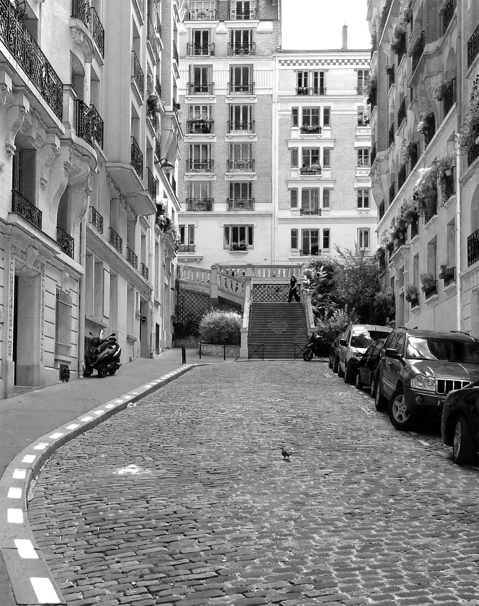 Rue Gaston-Couté - Paris XVIII